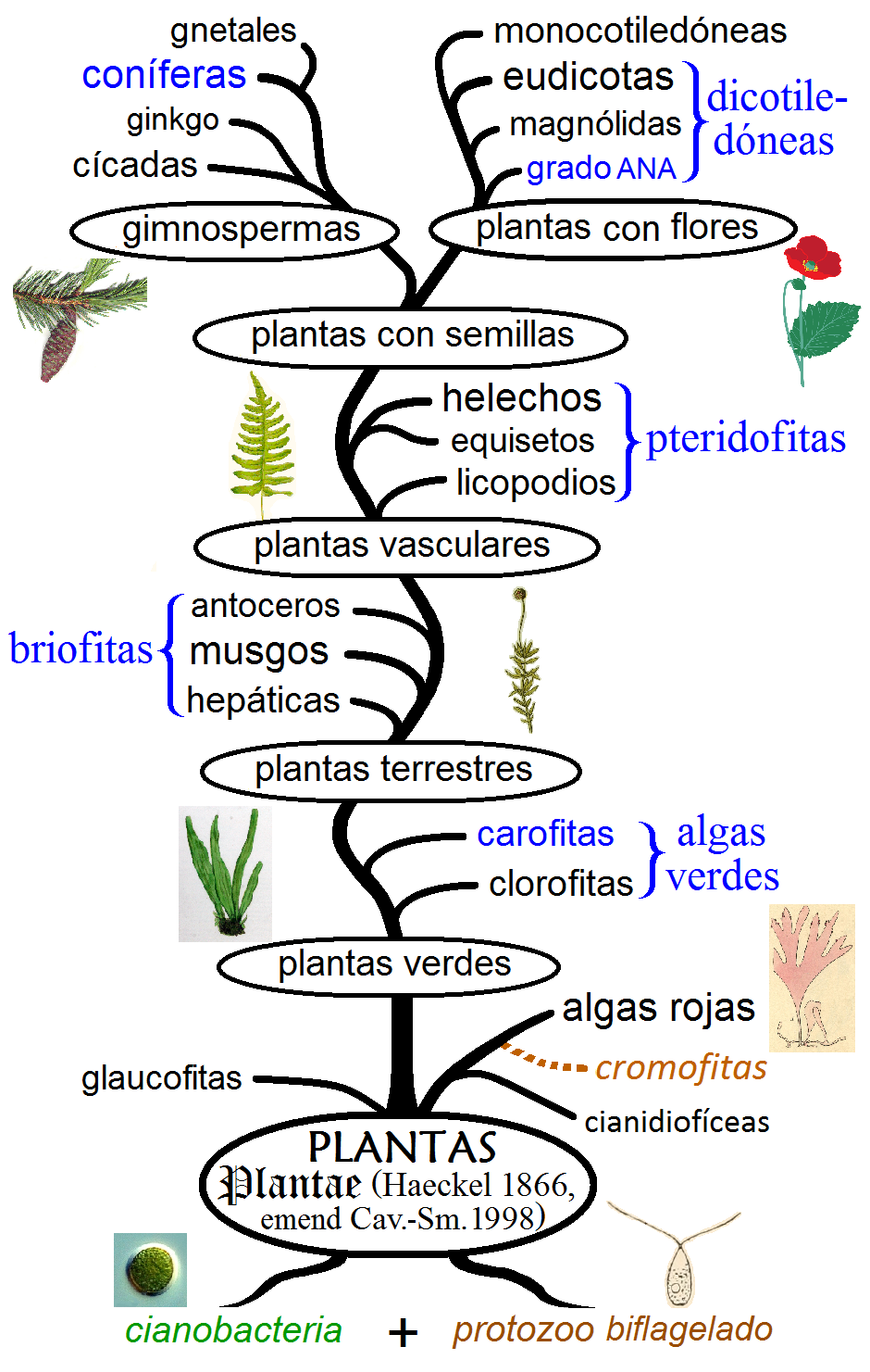 Árbol filogenético de las plantas, mostrando los principales clados y grupos tradicionales. Los grupos monofiléticos se muestran en negro y los parafiléticos en azul.